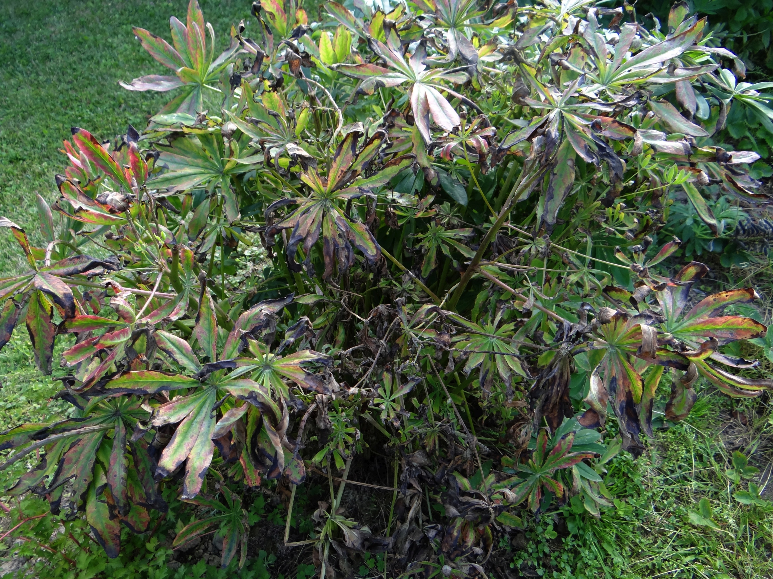 Pleiochaeta setosa on Lupinus polyphyllus